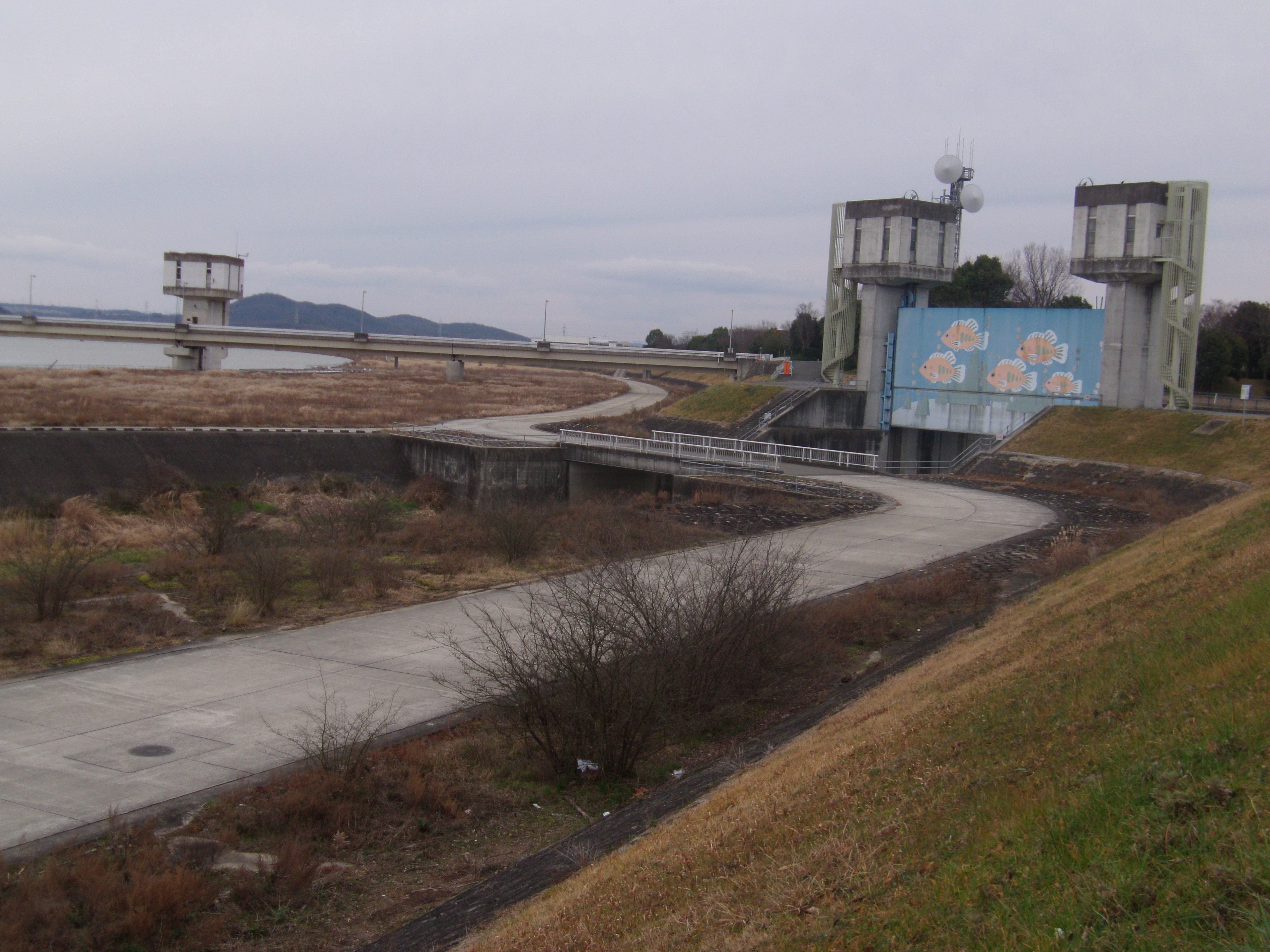 加古川合流部に設けられた草谷川樋門、背後に加古川大堰が見える（大堰記念公園） 五ヶ井用水と新井用水がゲートの内側から取水されている